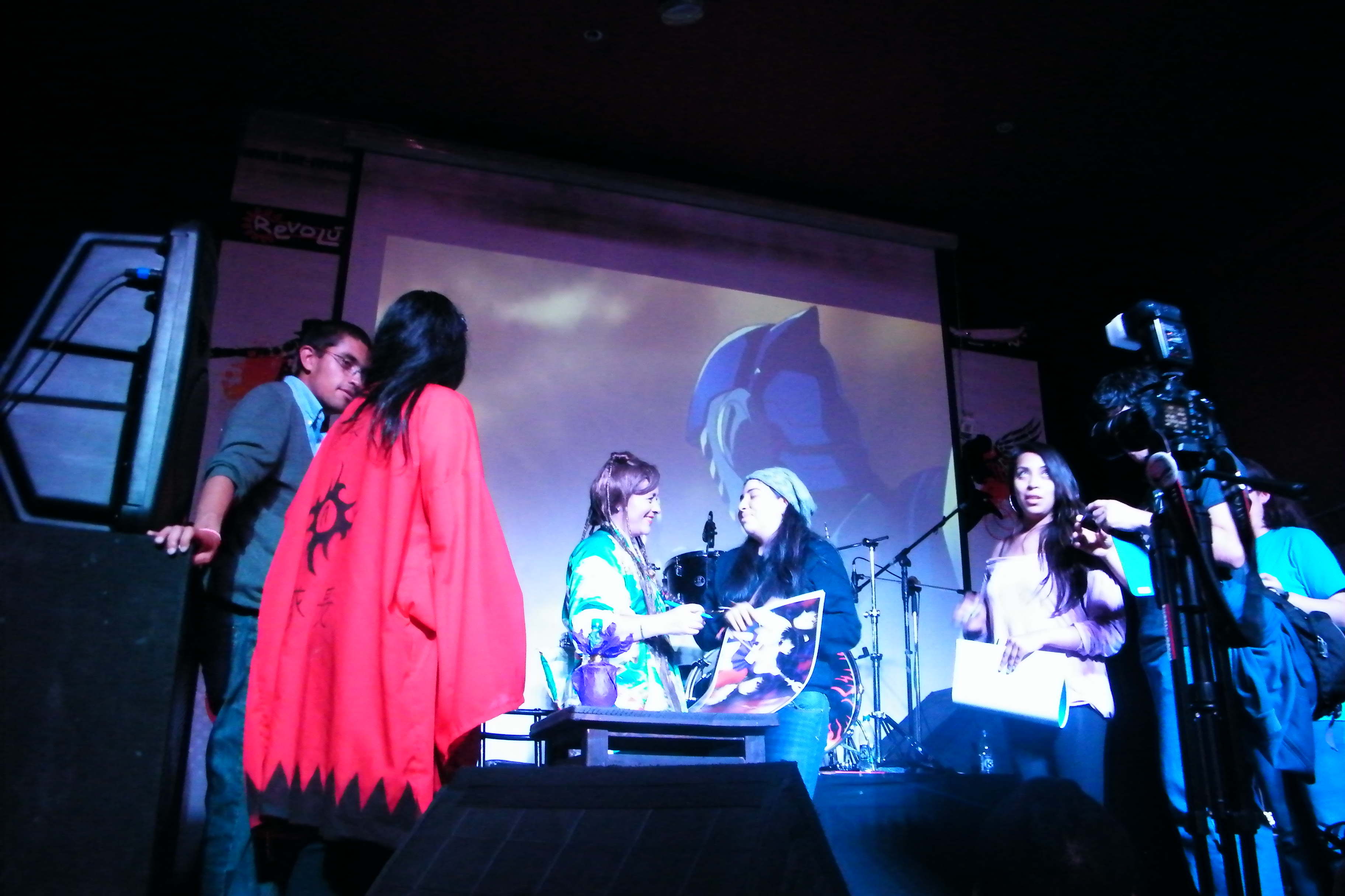 Tokyo Impact! Latino 3 foto